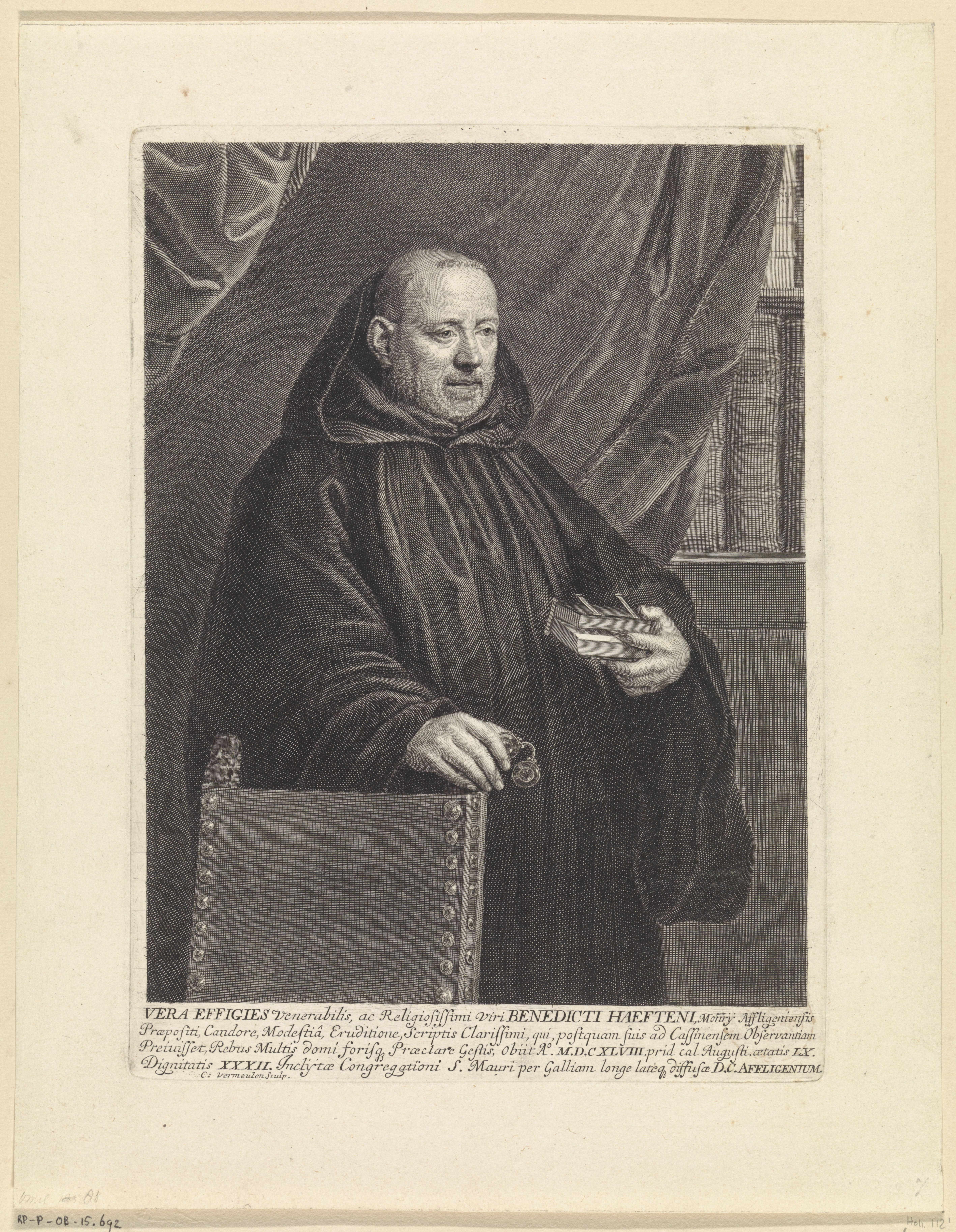 IdentificatieTitel(s): Portret van Benedictus van HaeftenObjecttype: prent Objectnummer: RP-P-OB-15.692Catalogusreferentie: Hollstein Dutch 112-1(2)Opschriften / Merken: verzamelaarsmerk, verso linksonder, gestempeld: Lugt 240Omschrijving: De Benedictijner monnik en schrijver Benedictus van Haeften, met in zijn hand een boek en een bril.VervaardigingVervaardiger: prentmaker: Cornelis Martinus Vermeulen (vermeld op object)Plaats vervaardiging: AntwerpenDatering: 1654 - 1709Fysieke kenmerken: gravureMateriaal: papier Techniek: graveren (drukprocedé)Afmetingen: plaatrand: h 287 mm × b 208 mmOnderwerpWat: eyeglasses, spectaclesWie: Benedictus van HaeftenVerwerving en rechtenVerwerving: overdracht van beheer 1816Copyright: Publiek domein